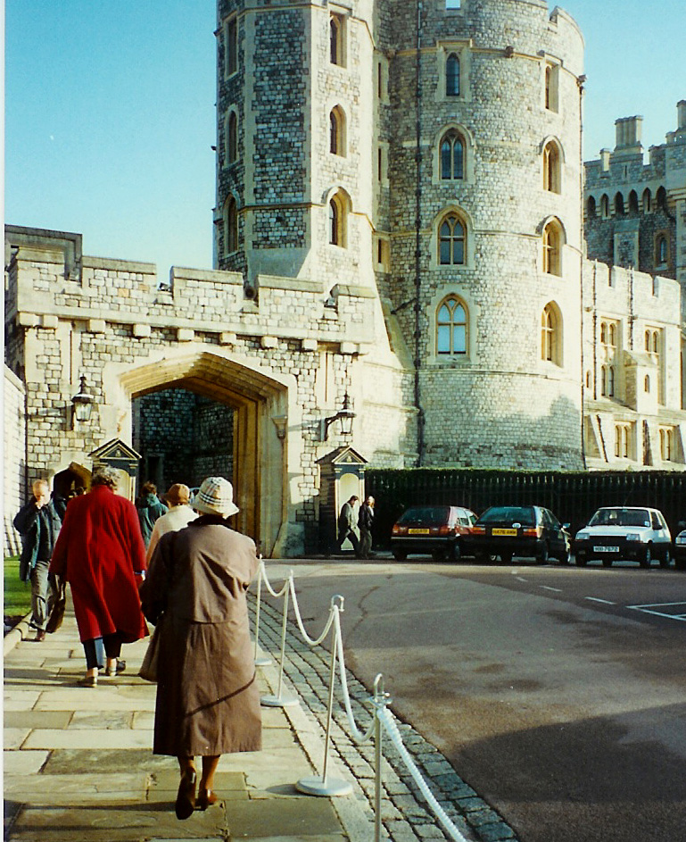 Windsor Schlsass3